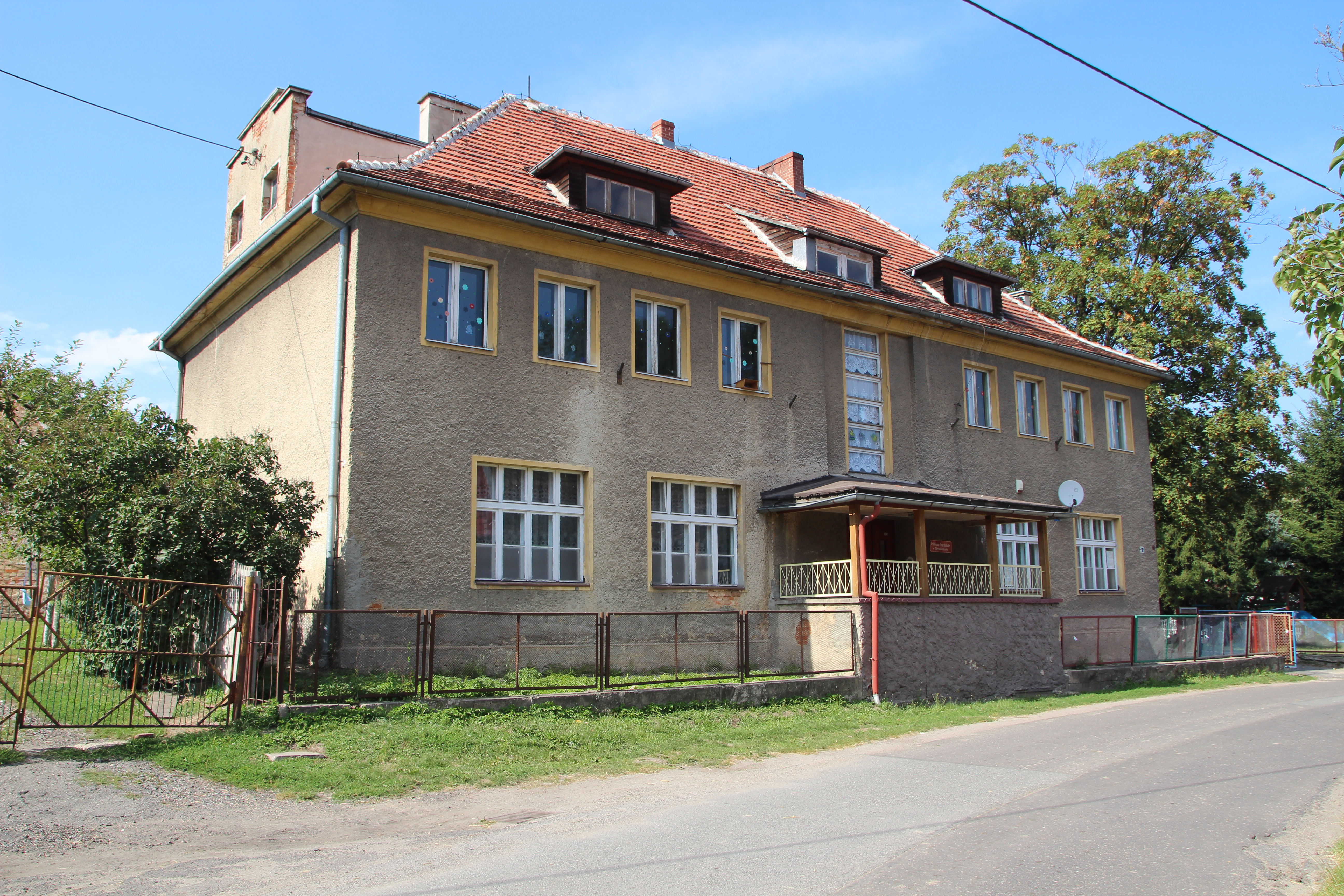 Mieszkowice – wieś w Polsce położona w województwie opolskim, w powiecie prudnickim, w gminie Prudnik.